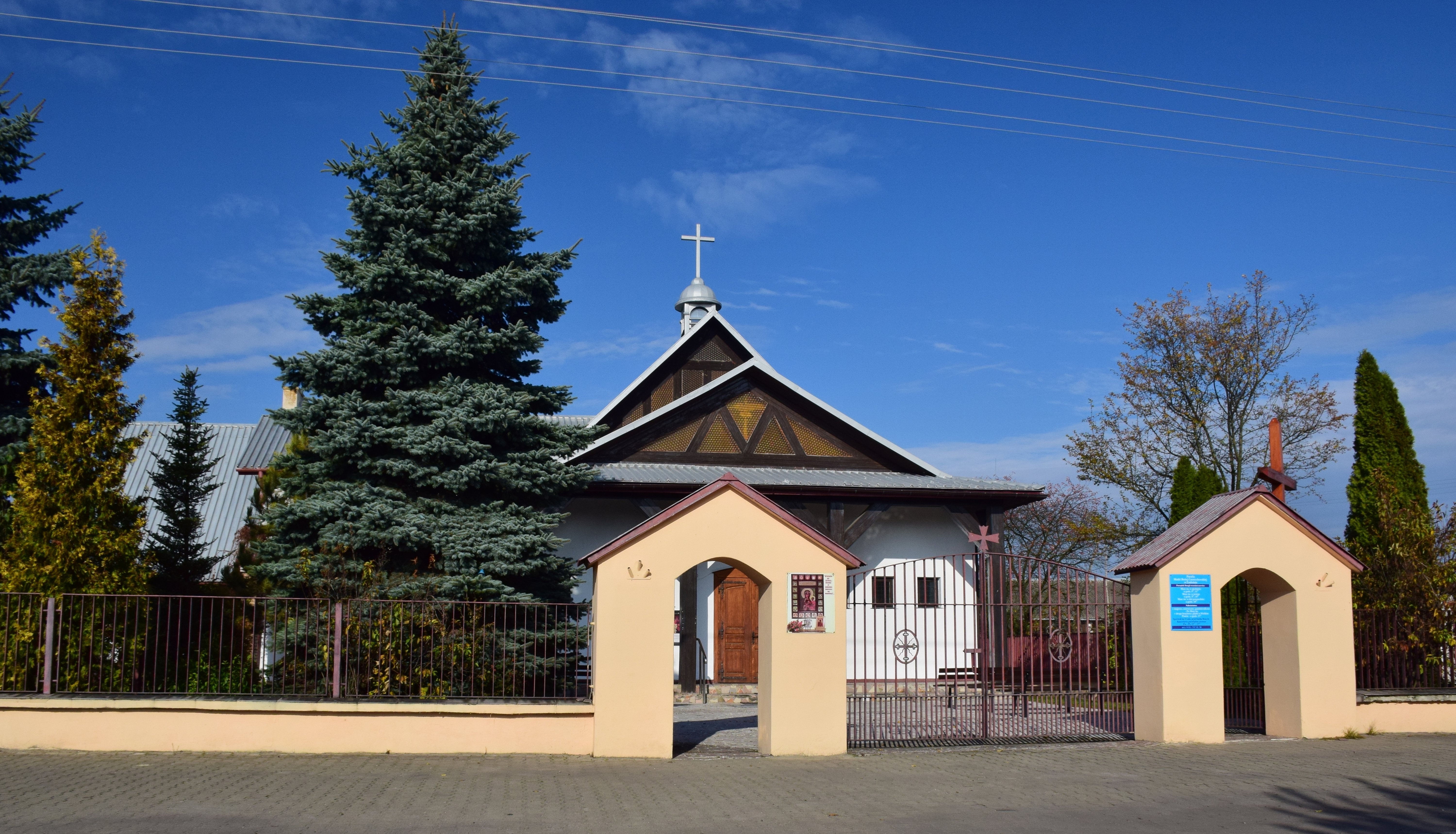 Kościół parafialny, pw. Matki Bożej Częstochowskiej w Ludwinie, pow. Łęczna, woj. lubelskie.